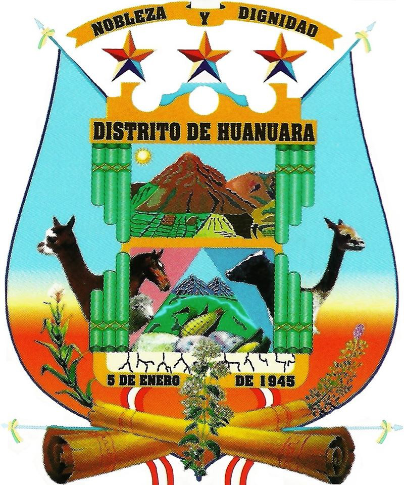 Escudo del Distrito de Huanuara